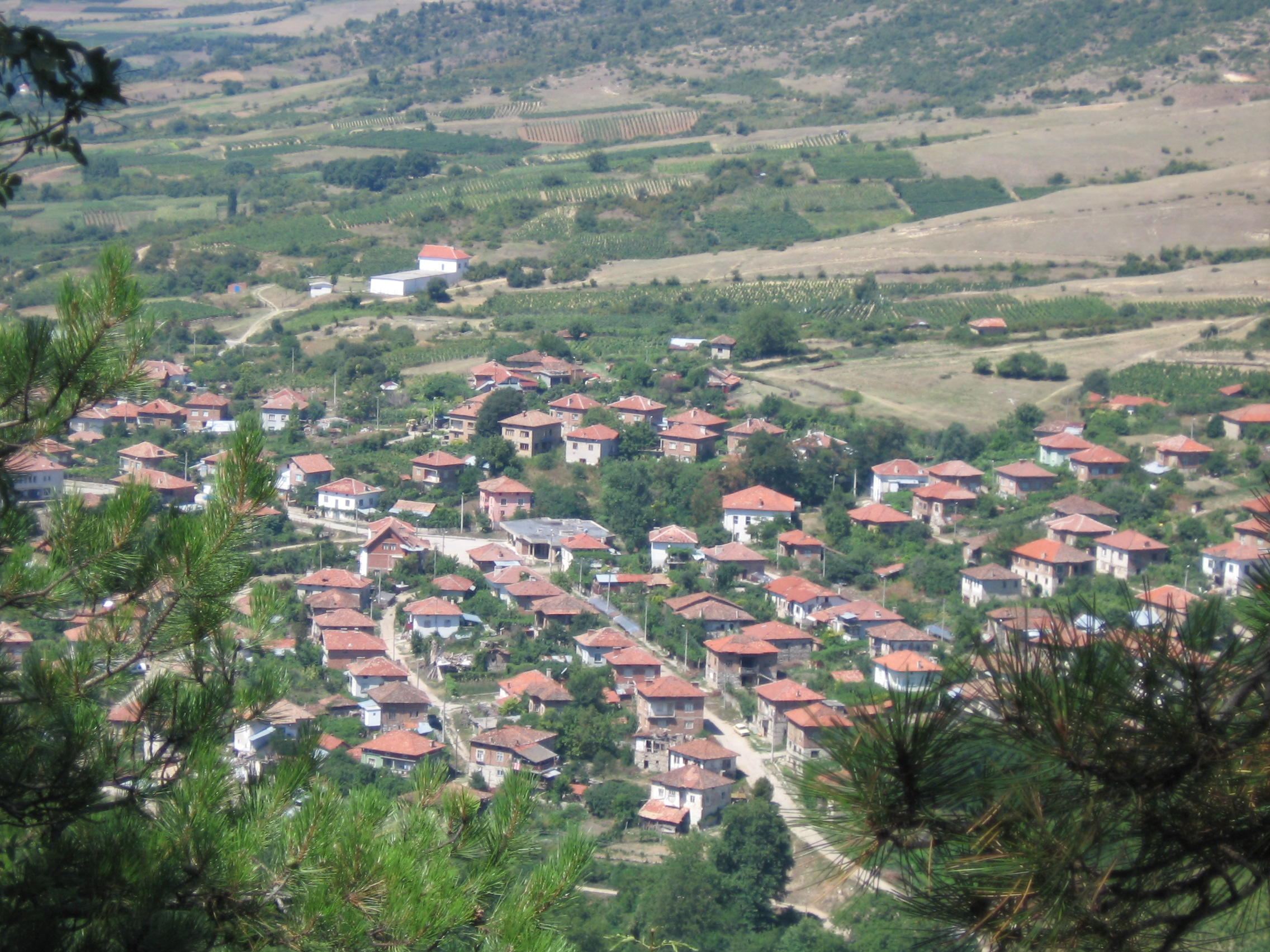 Село Калиманци (Област Благоевград), България